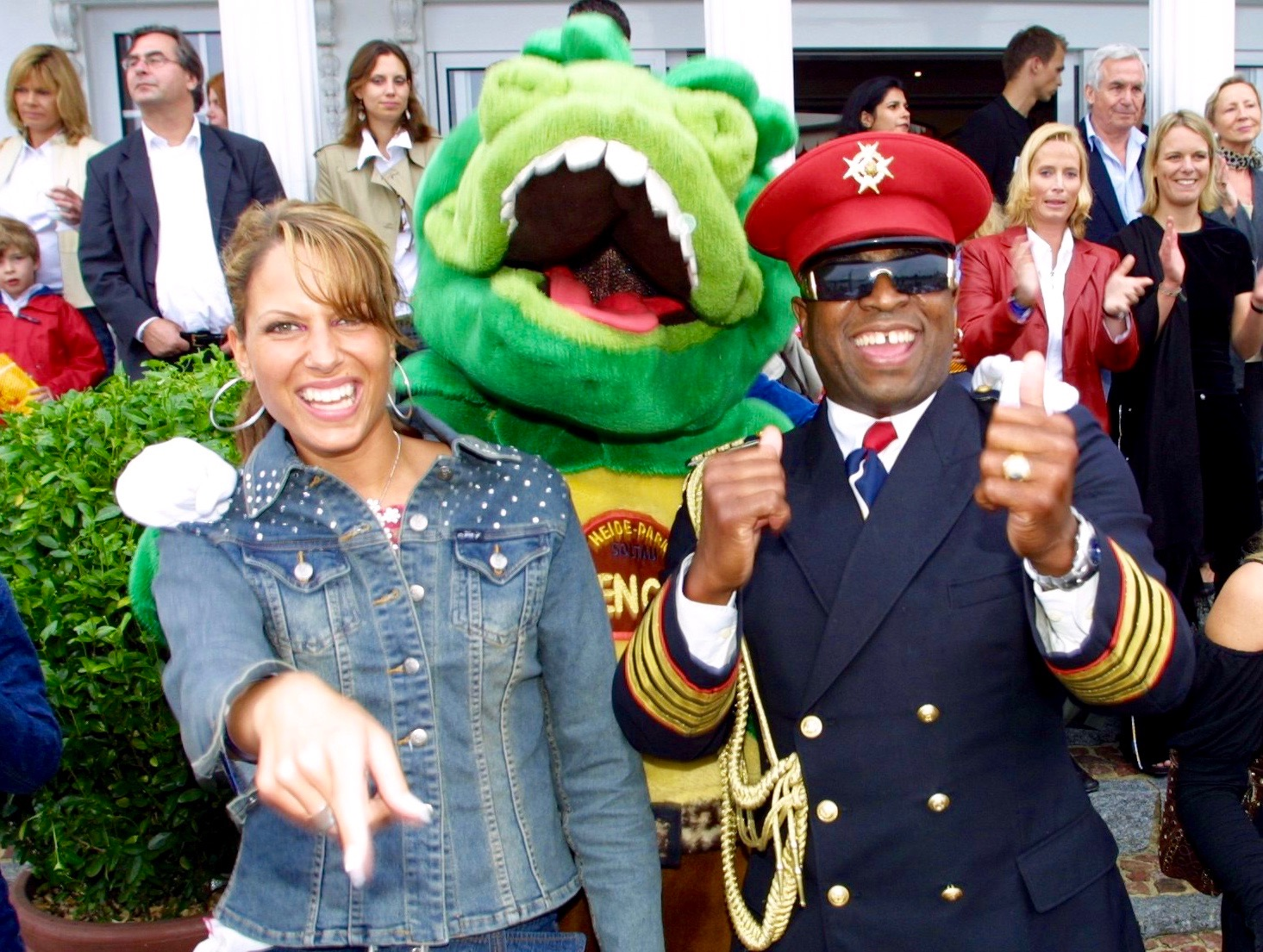 Franky Gee und Illie Love (Captain Jack) im Heidepark Soltau